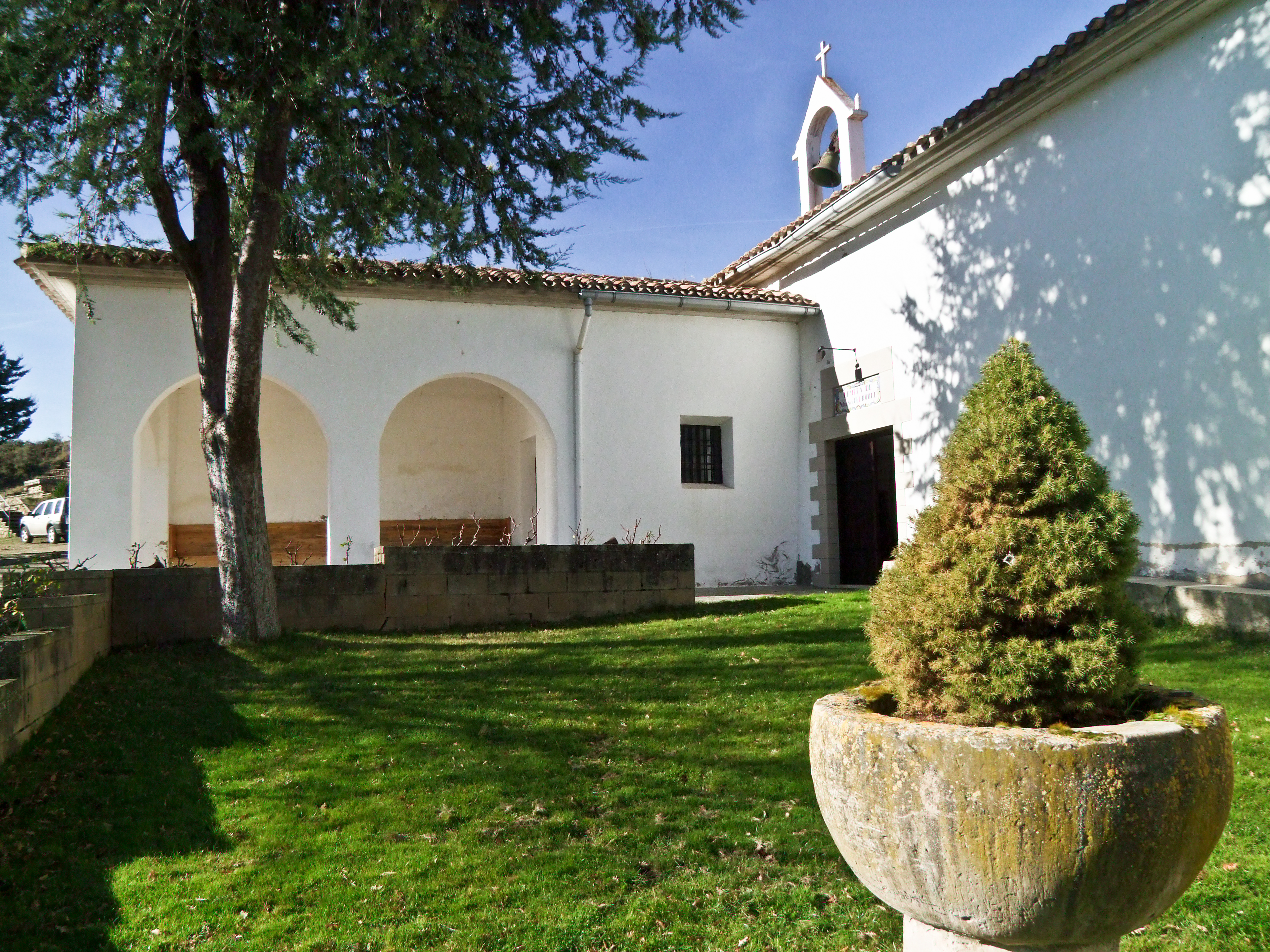 Ermita de la Virgen del Roble en la localidad de Sorzano, La Rioja - España